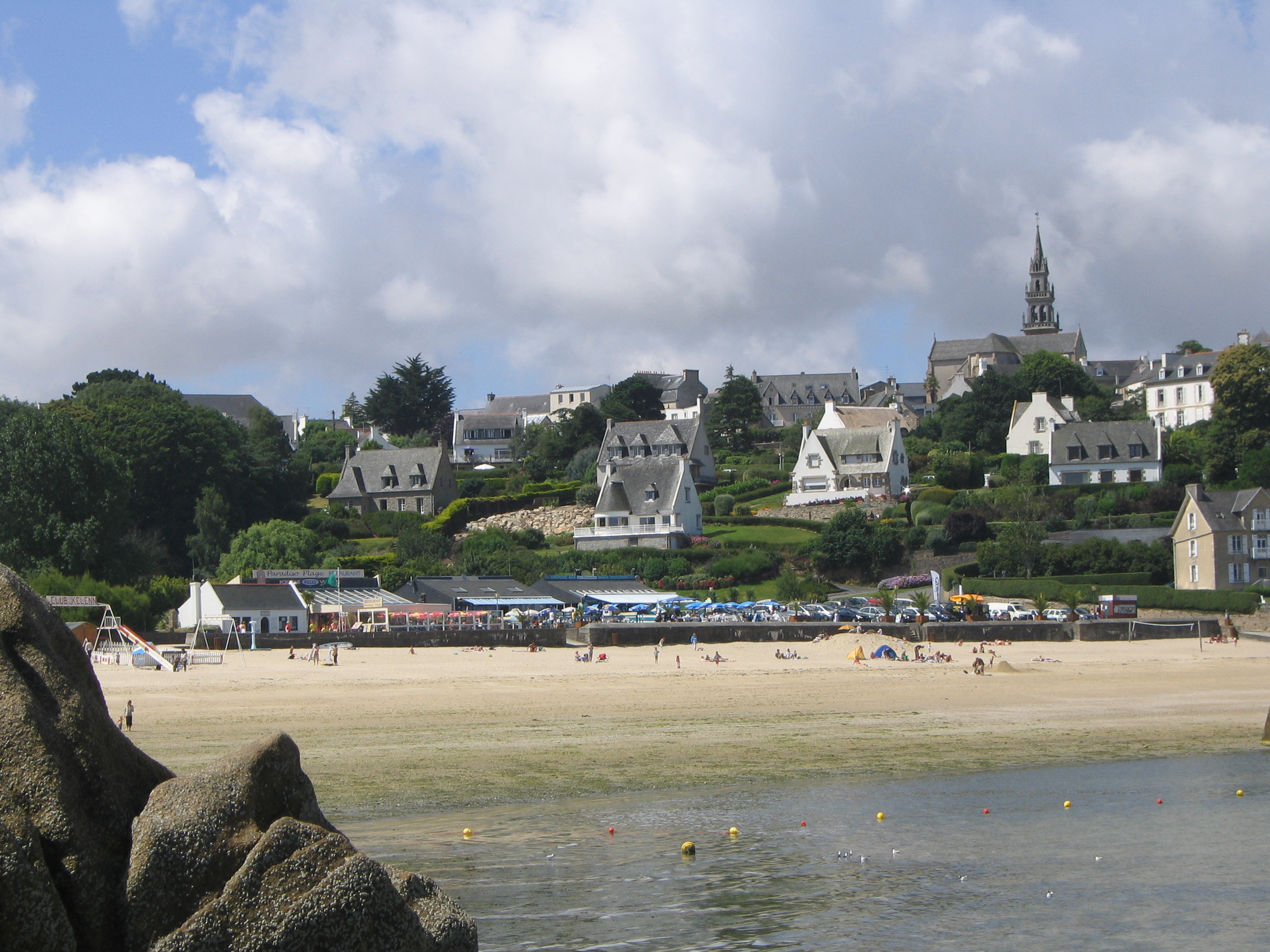 La plage du Kélenn